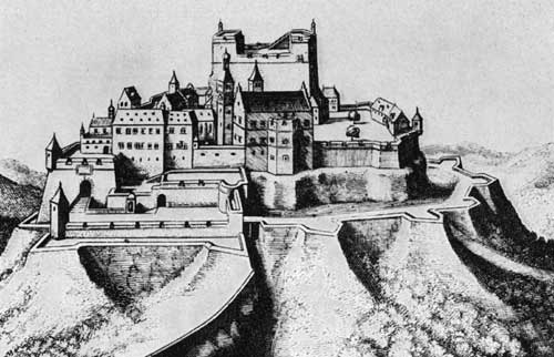 Kupferstich der Burg Lichtenberg im Elsass